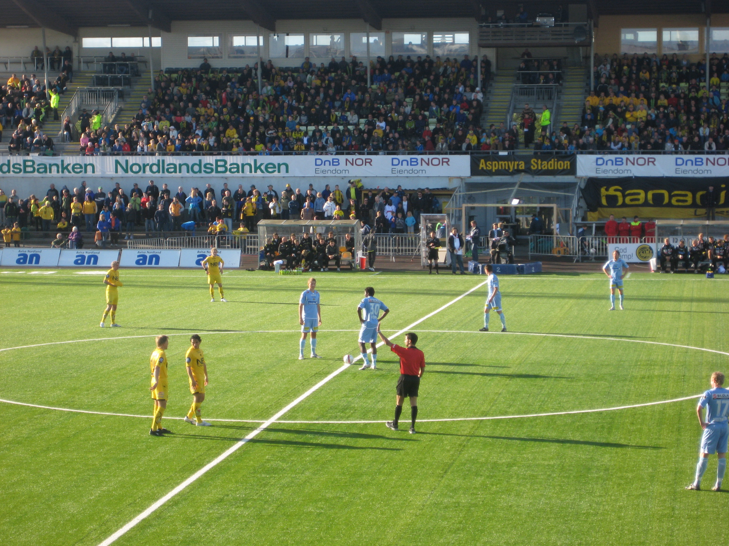 [:Bodø/Glimt (gul) mot Lillestrøm (turkis) i 9. serierunde i Tippeligaen 2008 på Asmyra stadion. Start av første omgang.